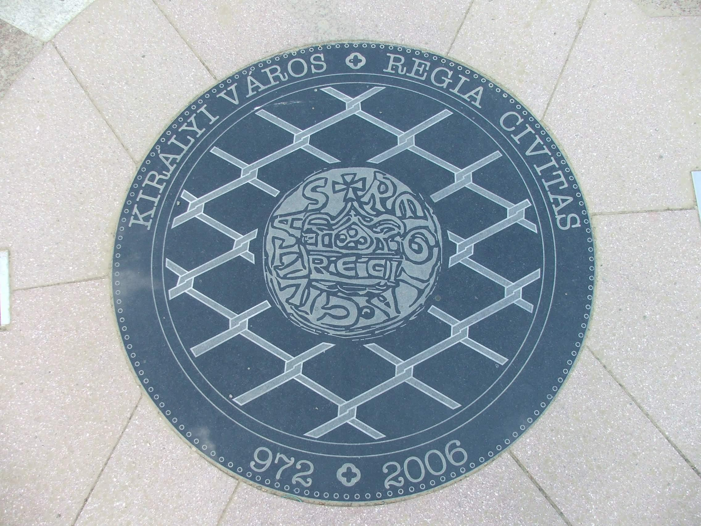 Esztergom 927-2006 Széchenyi square